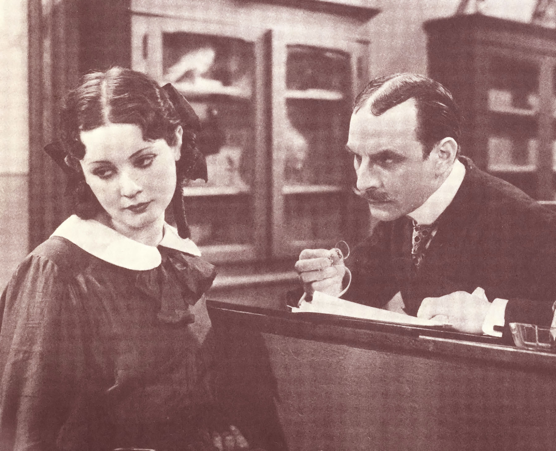 Maria Denis nel film Seconda B diretto nel 1934 da Goffredo Alessandrini Licensing Categoria:Immagini di Indeciso42 dubbie